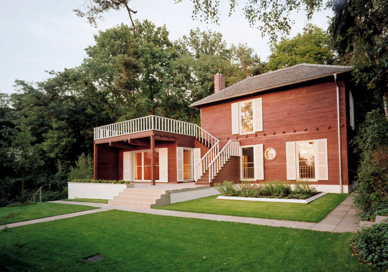 Das Einstein-Haus in Caputh nach seiner aufwändigen Restaurierung.